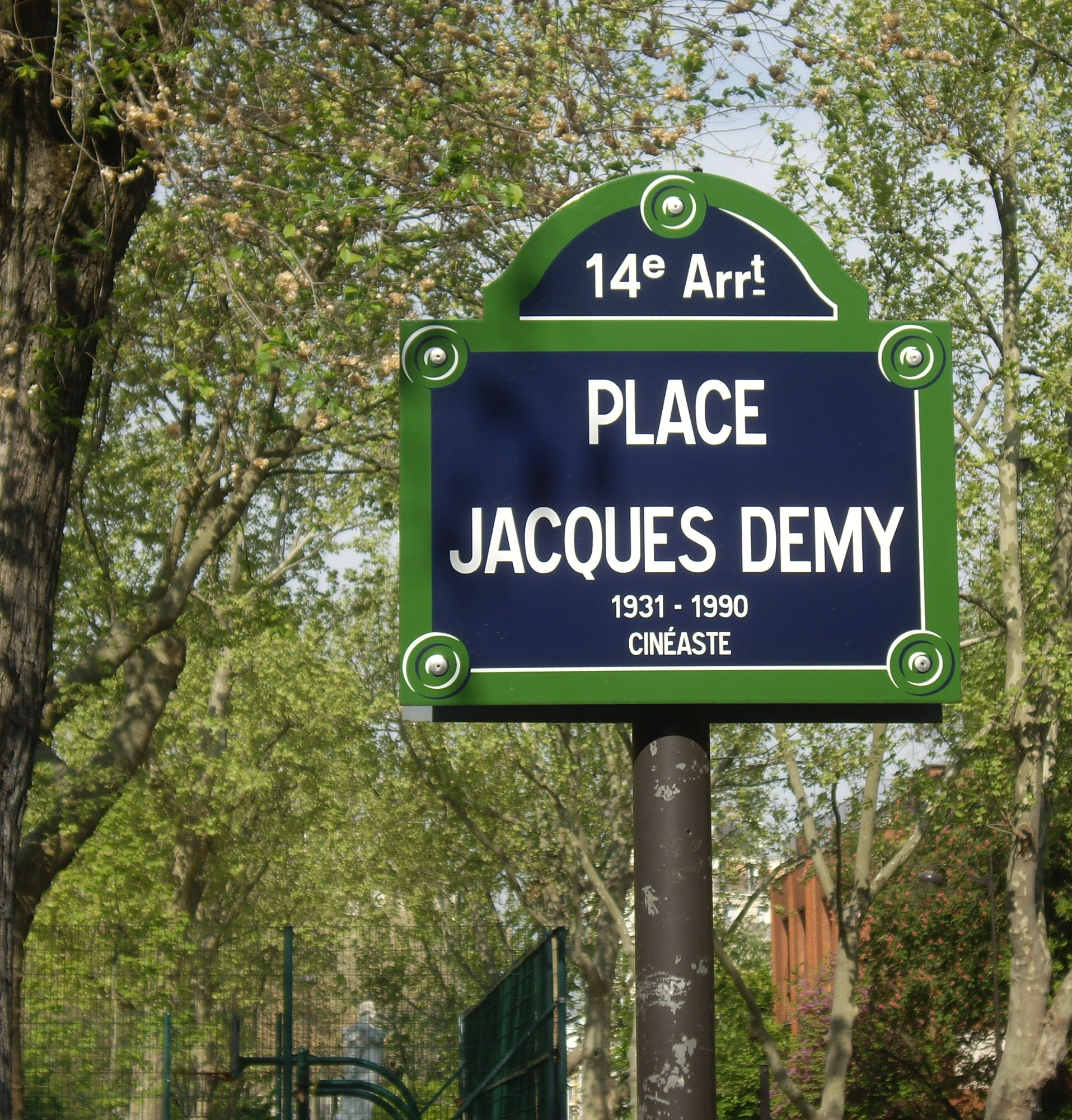 Place Jacques-Demy, Paris 14e. « Jacques Demy, 1931-1990, cinéaste. »